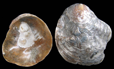 Anomia ephippium